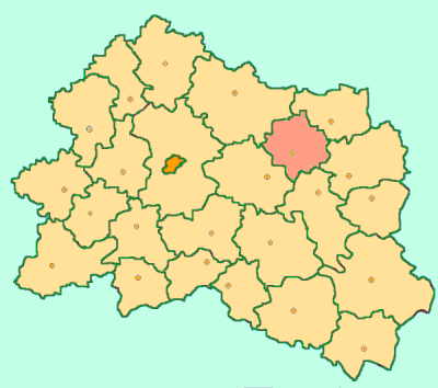 Orel Oblast map by Al Silonov Карта районов Орловской области